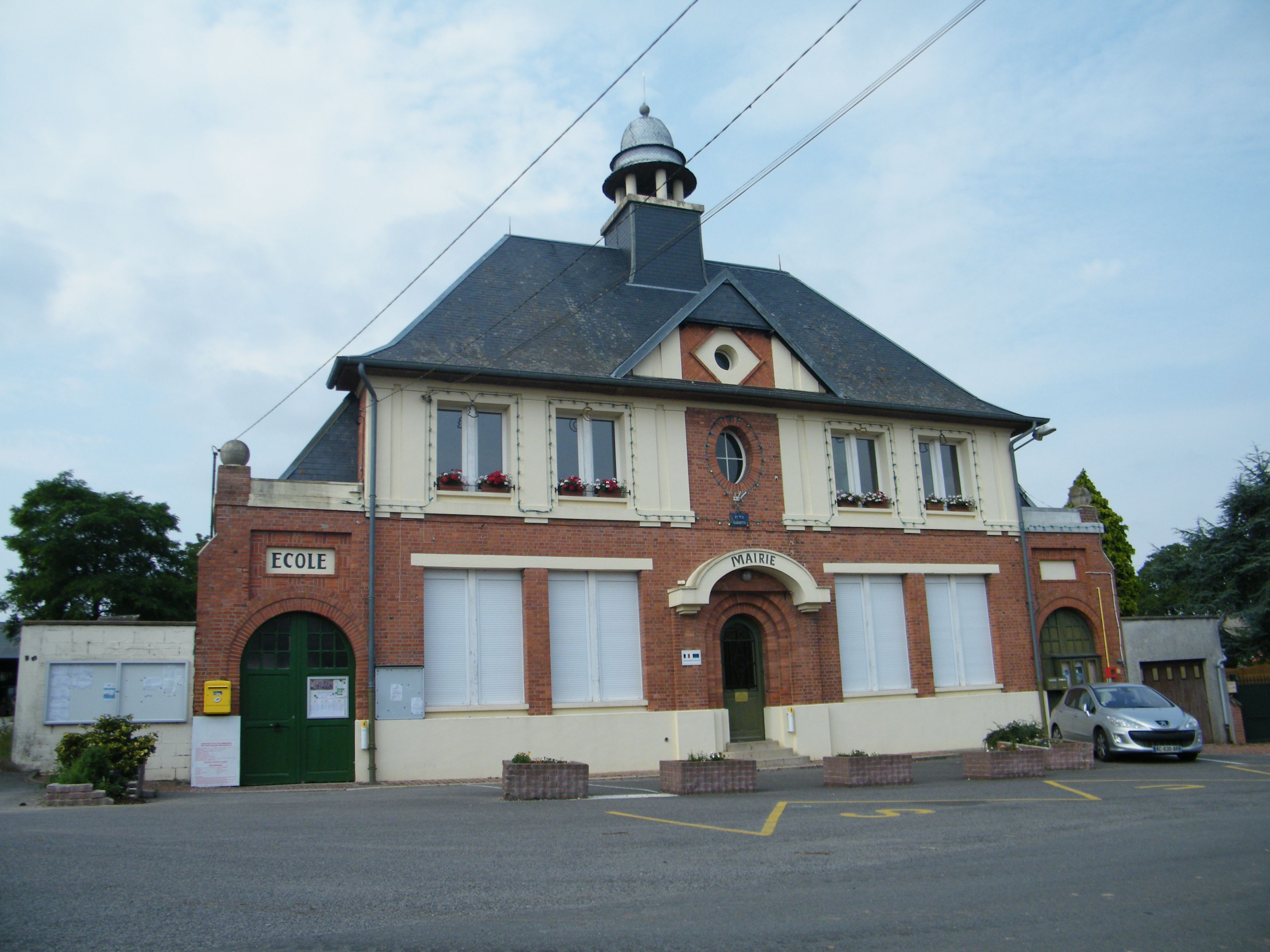 Mairie.